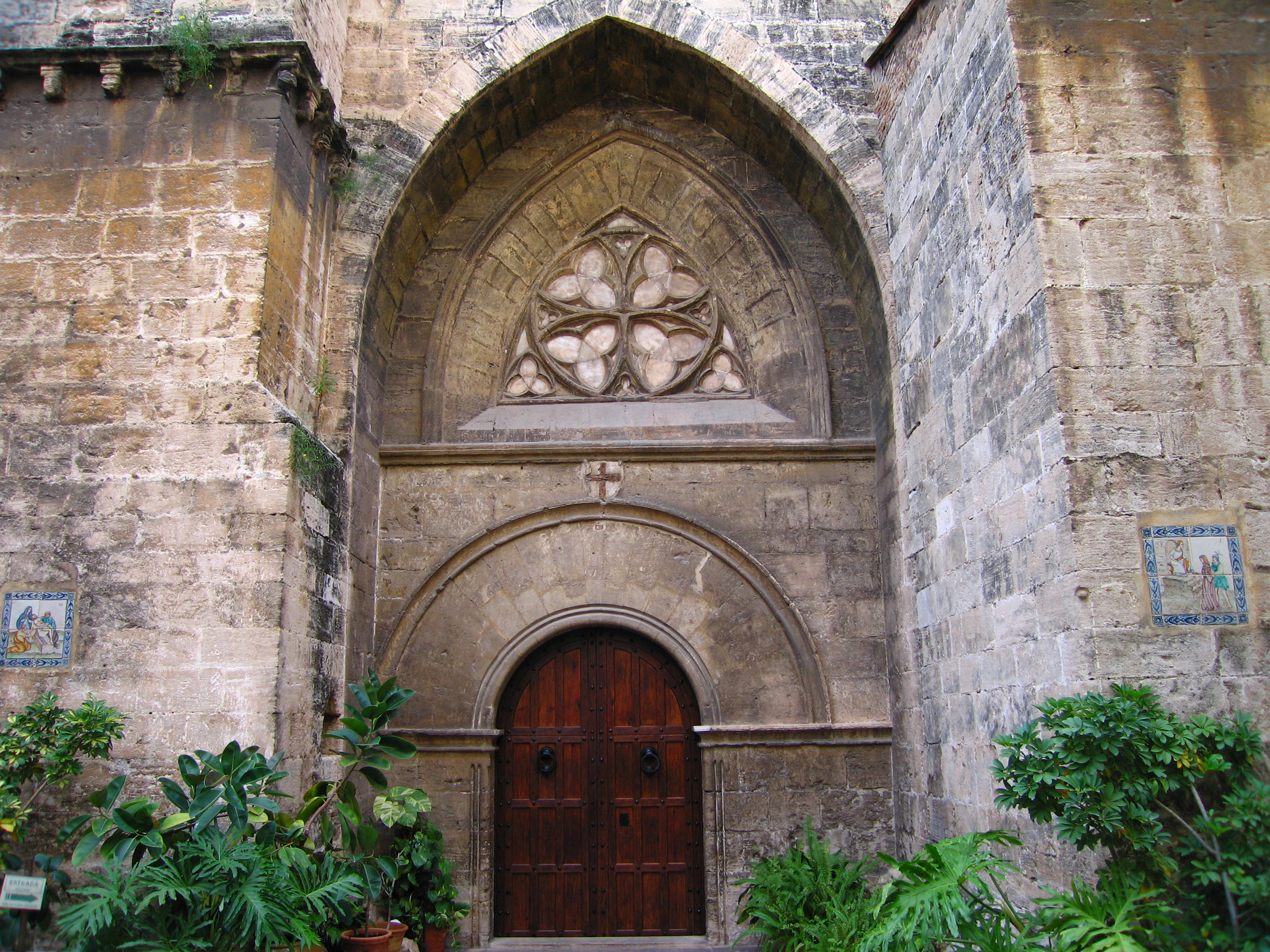 Sant Joan de l'Hospital (València). Porta Nord